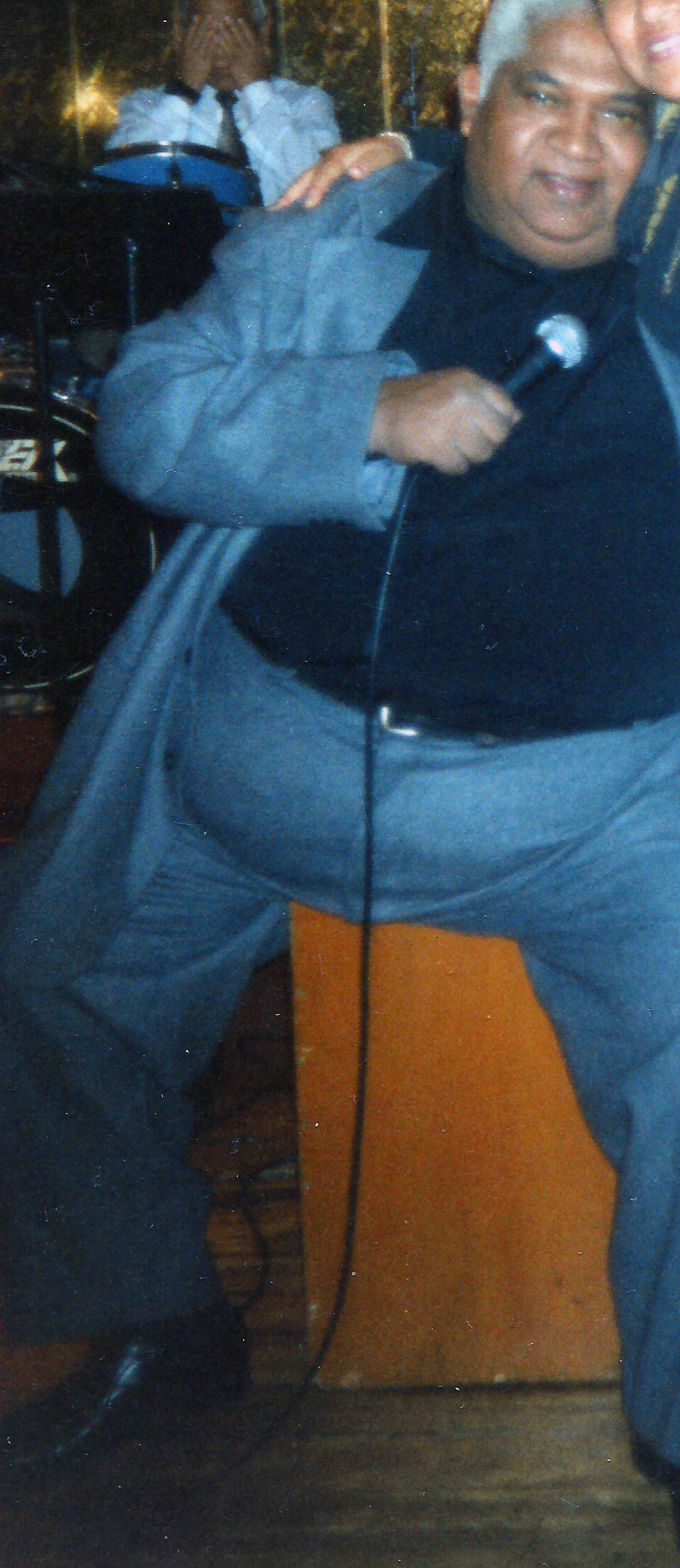 El cantante y cajonista afroperuano Arturo "Zambo" Cavero en el Sachún en 2005. La foto está recortada porque sale mi madre abrazándole.